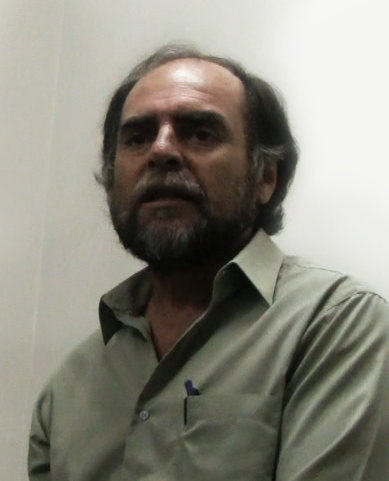 Escritor Dante Castro Arrasco